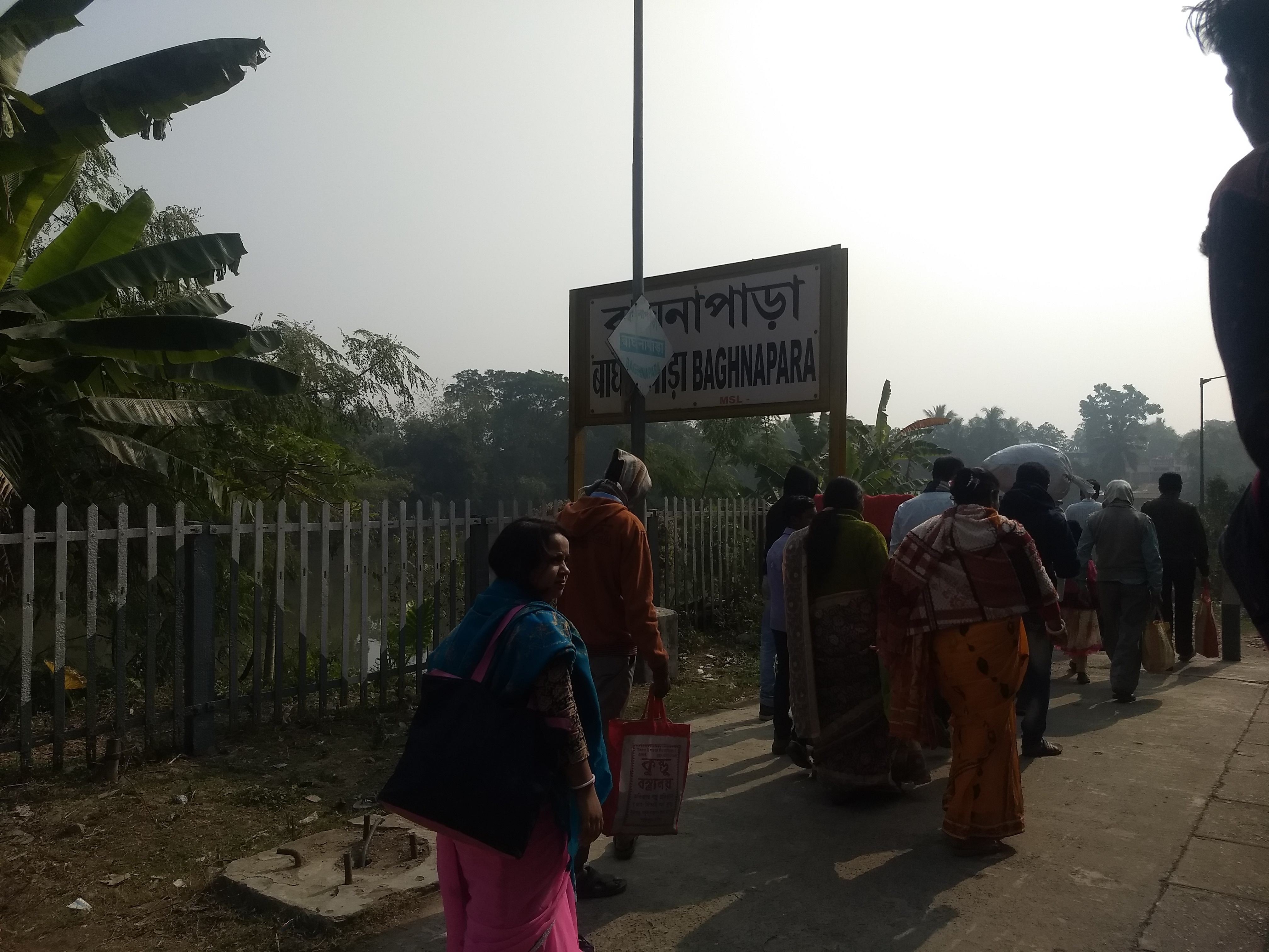 Baghnapara railway station